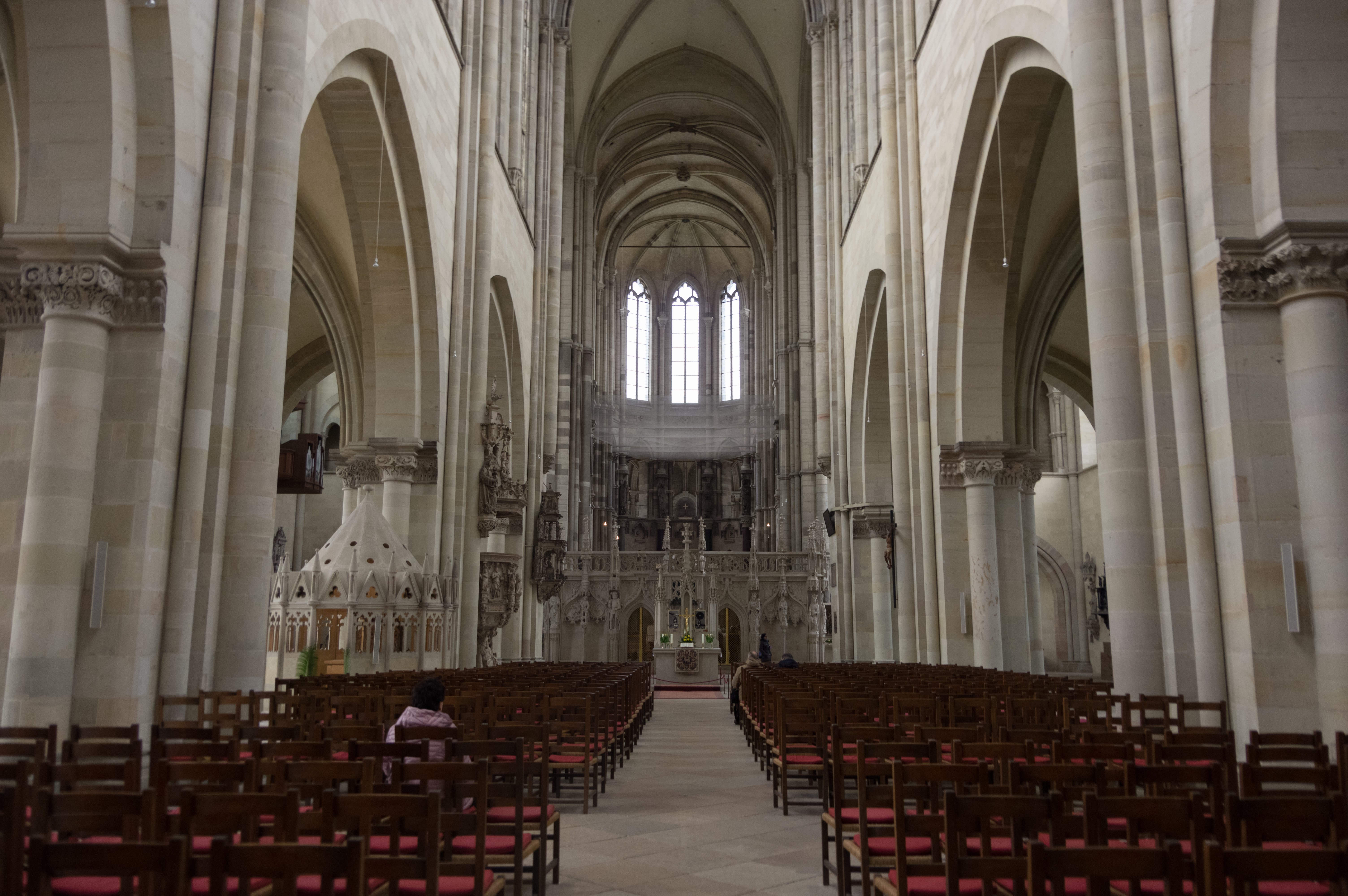 Magdeburg in Sachgsen Anhalt. Der Magdeburger Dorm steht unter Denkmalschutz. Das Bild zeigt ein Teil des Inneres.